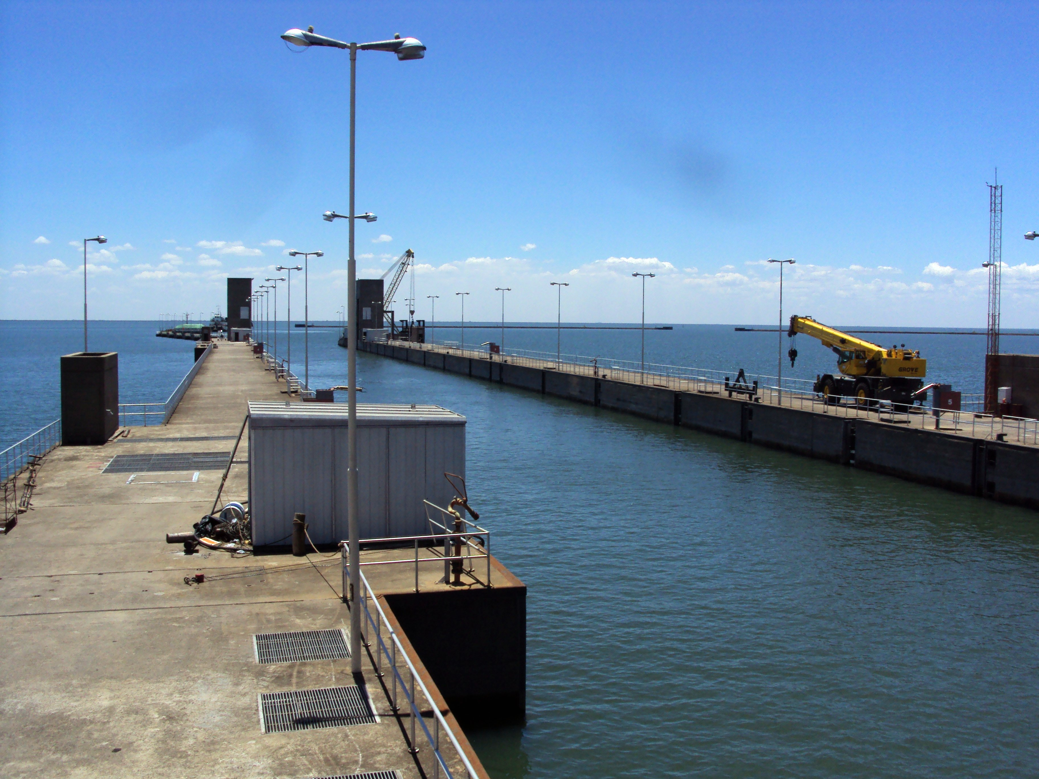 Yacyreta esclusa